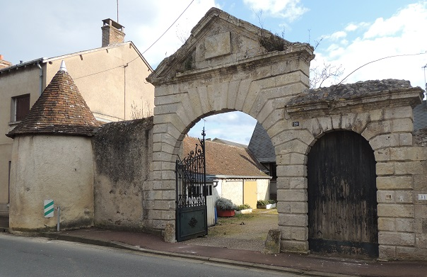 Porte de la Perrine avec de gauche à droite: une des tourelles d'angle, le mur, le portail avec sa grille et son fronton et la porte de l'ancien manoir, tous les éléments de la protection